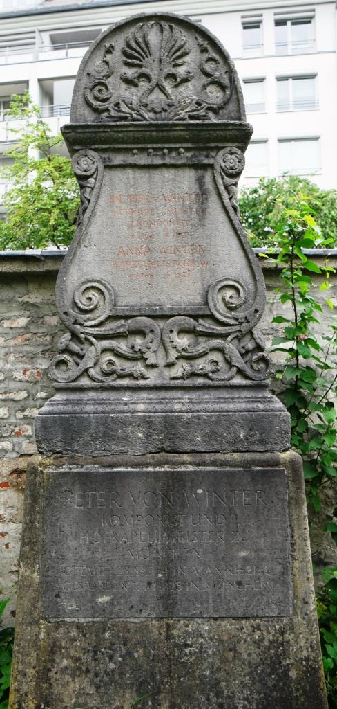 Grab des Komponisten und Kapellmeisters Peter von Winter (1754-1825) auf dem Alten Südlichen Friedhof in München